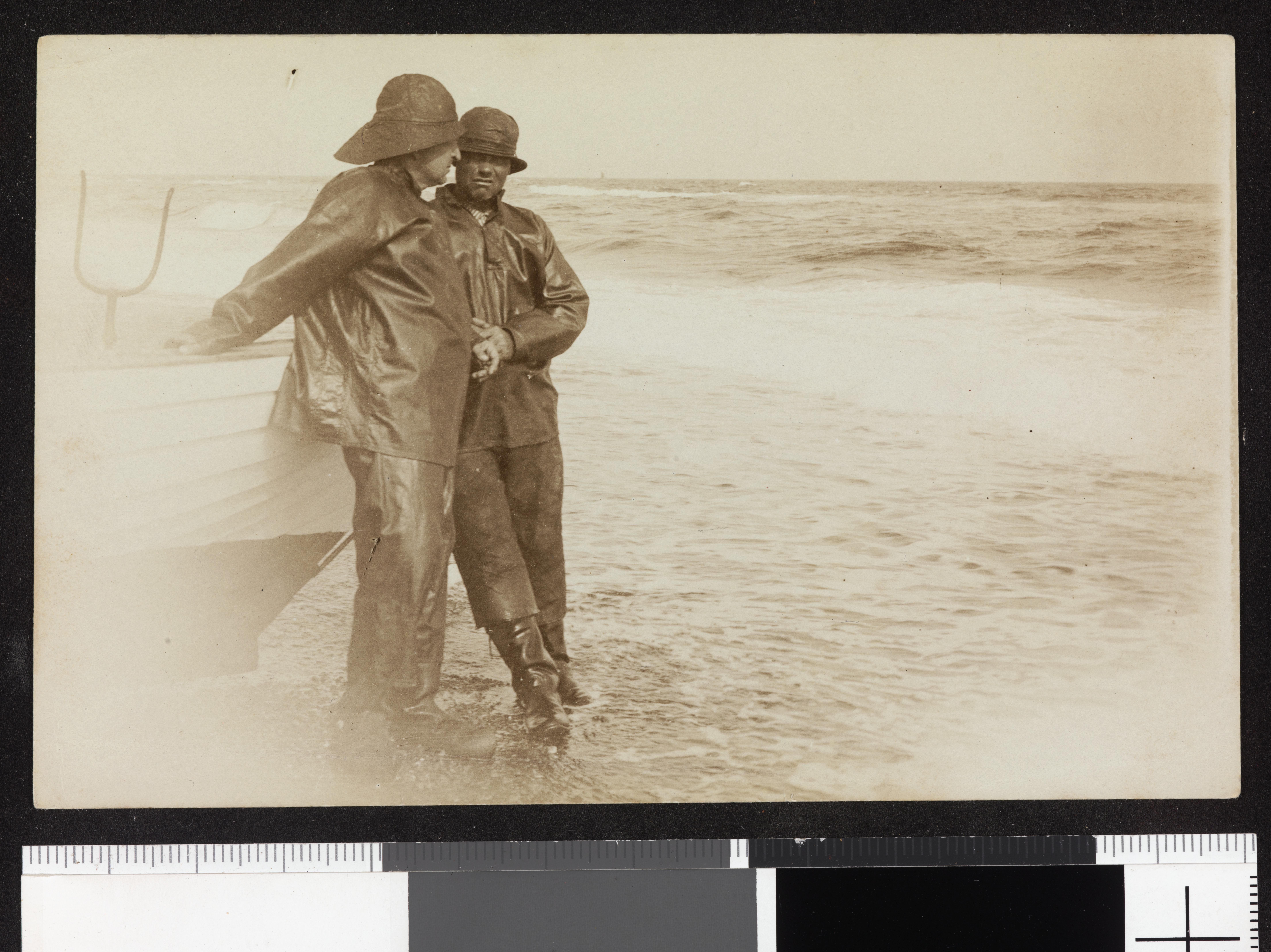 Bildet er hentet fra Nasjonalbibliotekets bildesamling